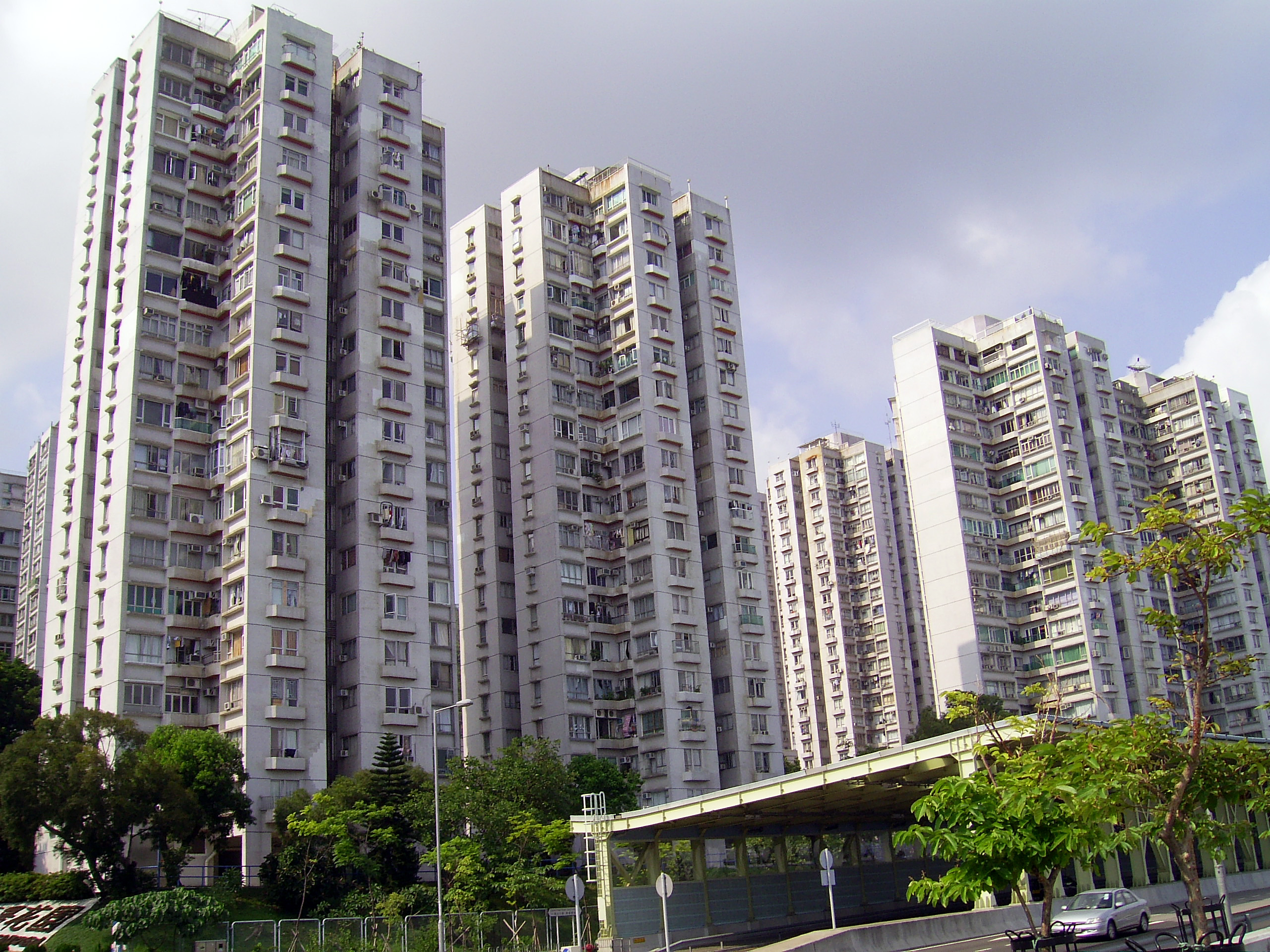 中文（香港）: 豪景花園